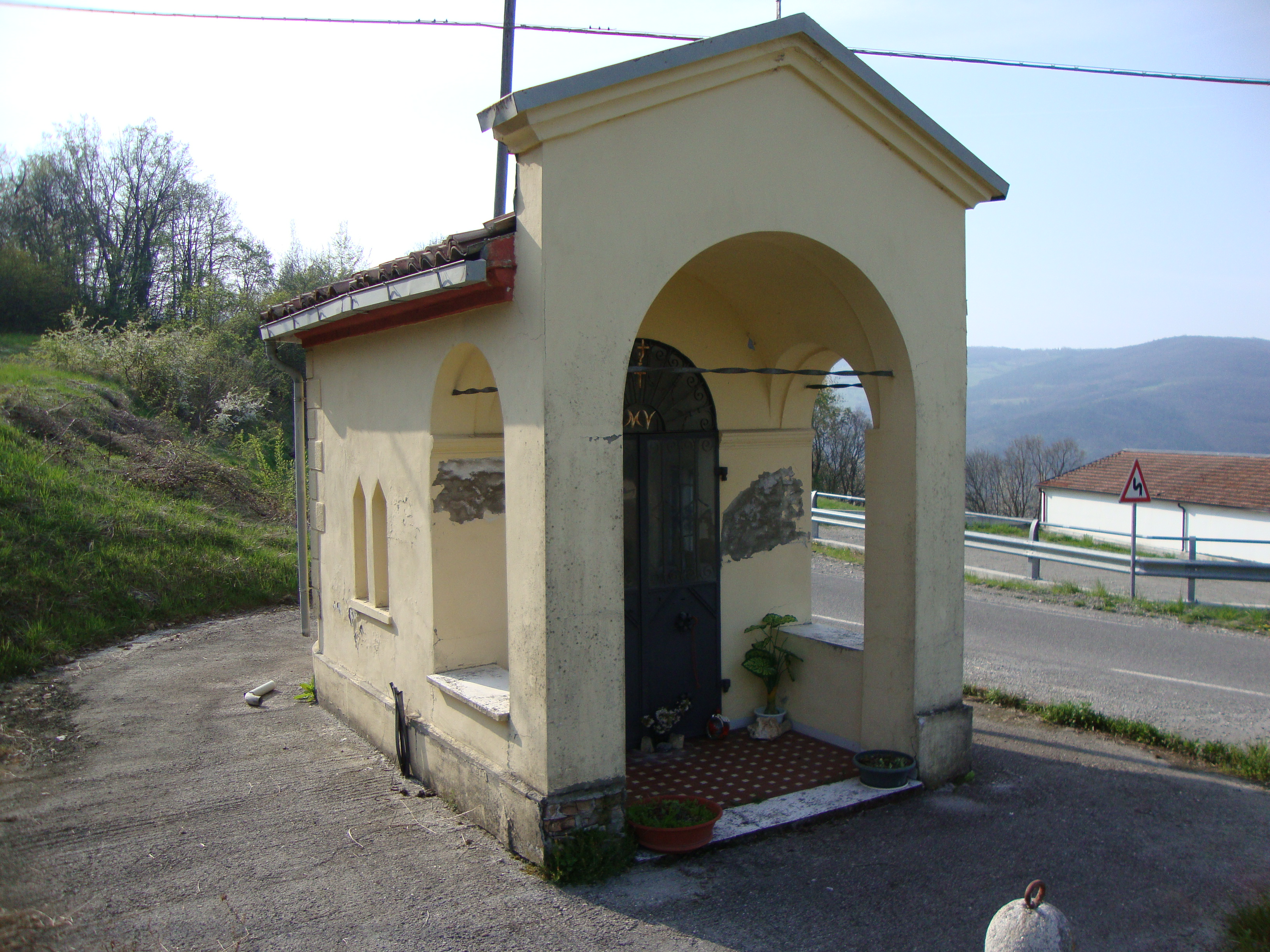 Mistadello Madonna Palazzi di Vezzolacca Vernasca